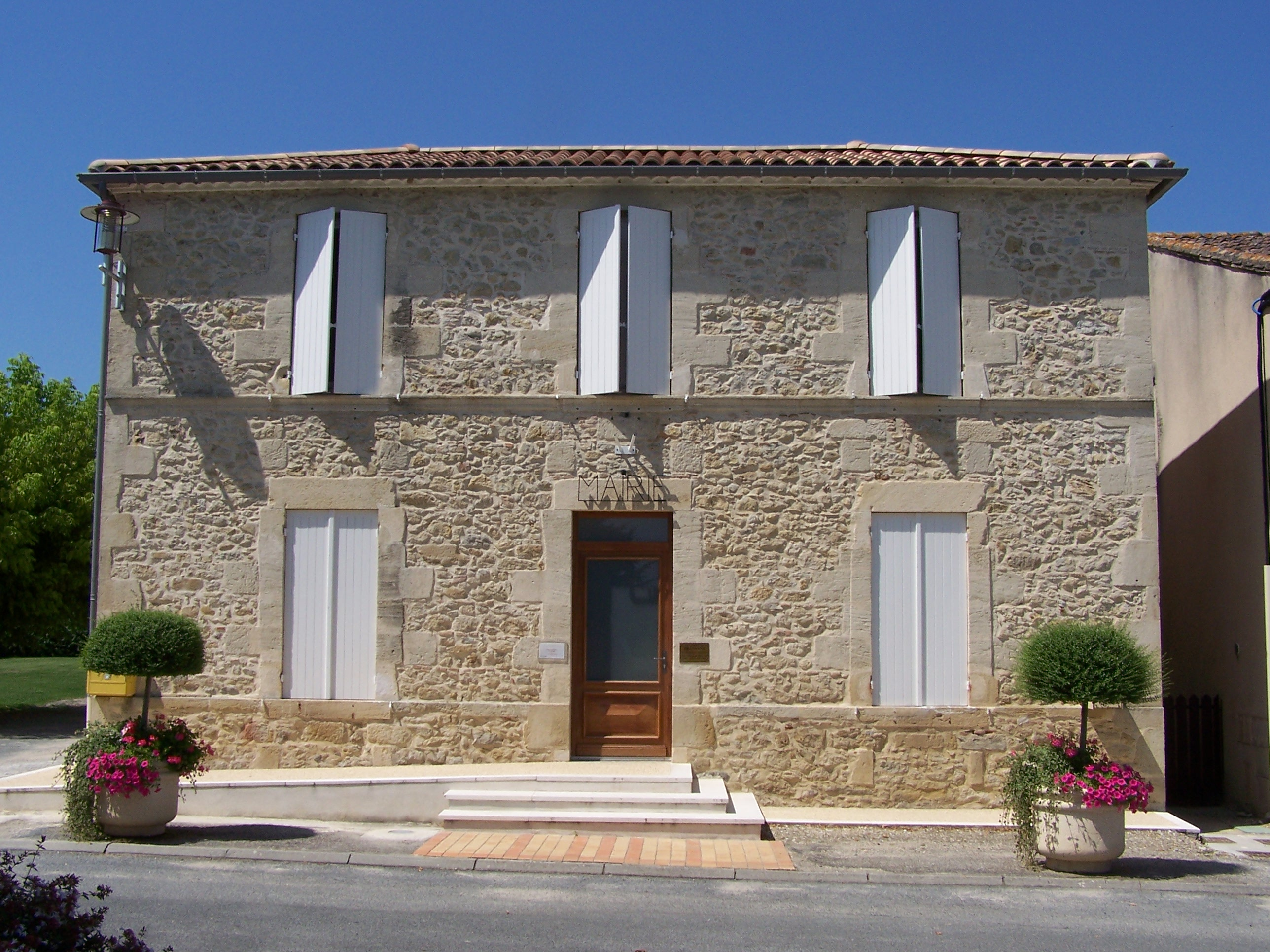 Mairie de Brannens, Gironde, France